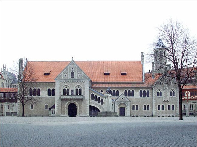 Burg Dankwarderode im Zentrum Braunschweigs Aufnahmedatum: 20. Februar 2003 Fotograf: ArtMechanic